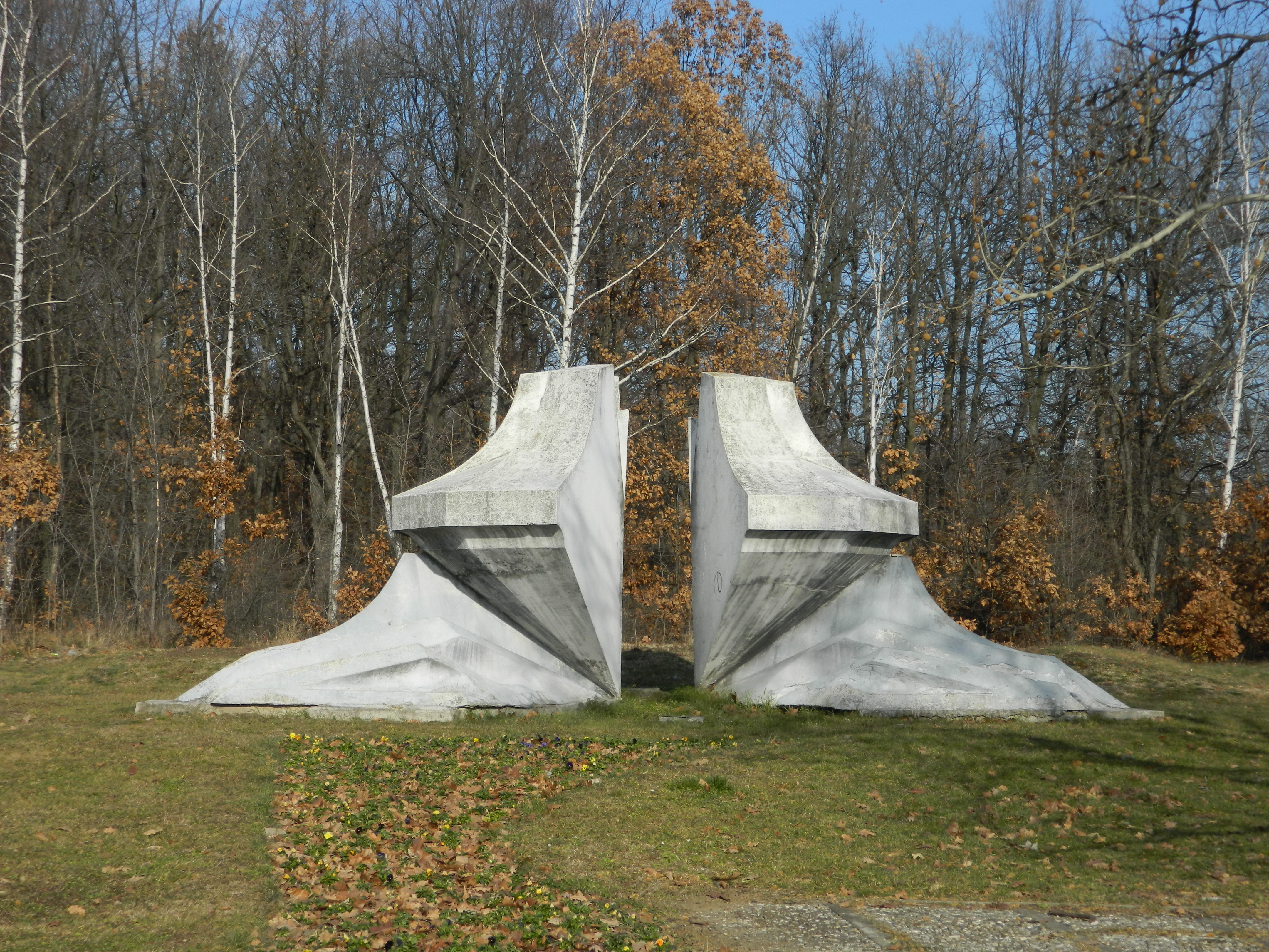 у оквиру спомен парка Крагујевачки октобар, рад Небојше Деље, 1968